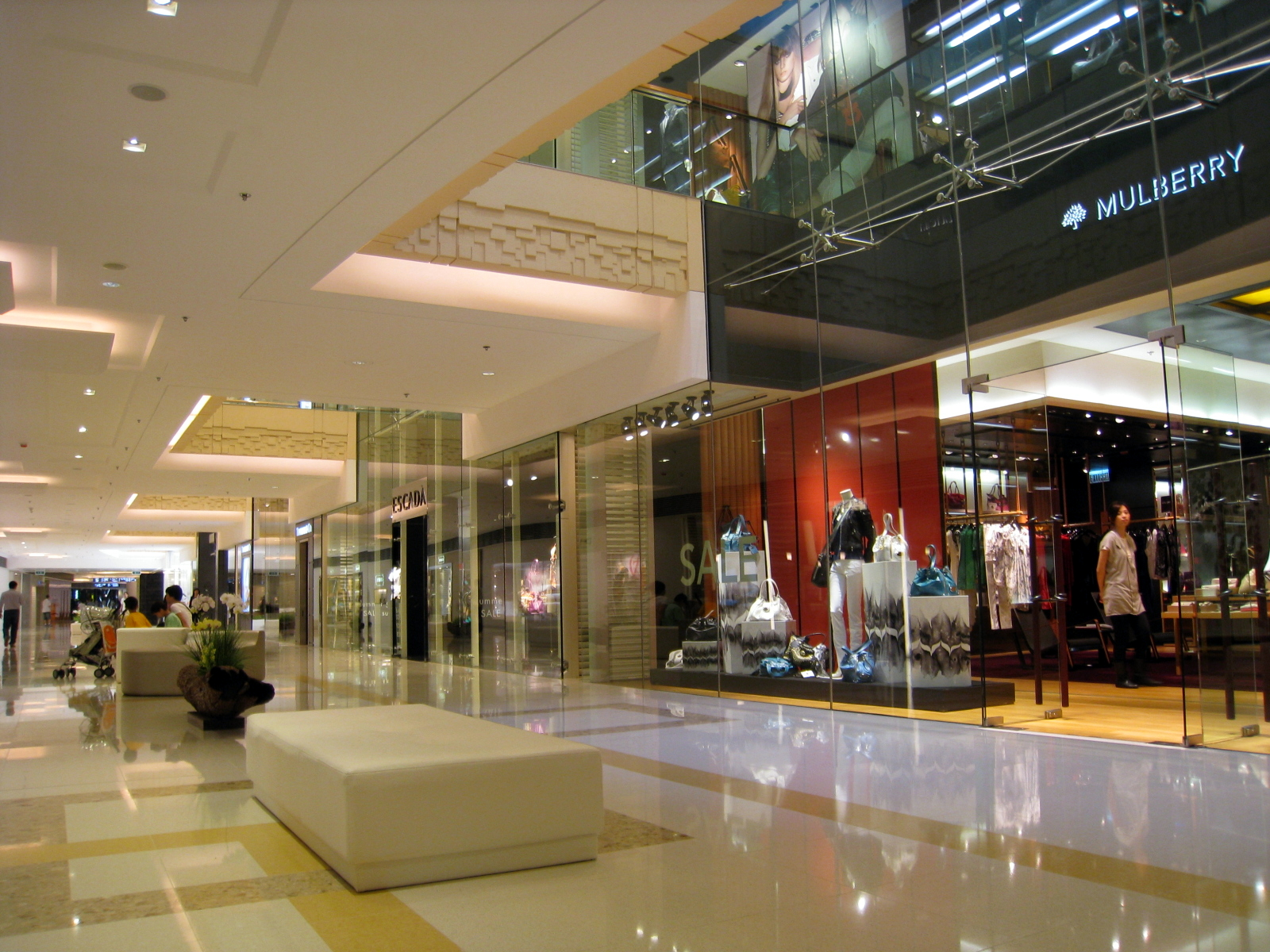 HK Elements Metal Zone Level 1 corridor 圓方